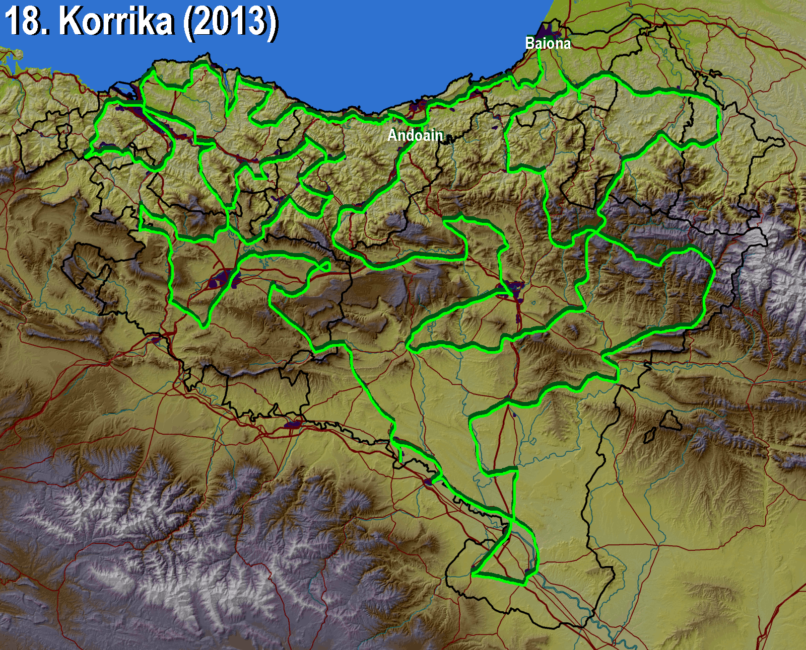 Korrikaren 18. edizioaren ibilbidea.